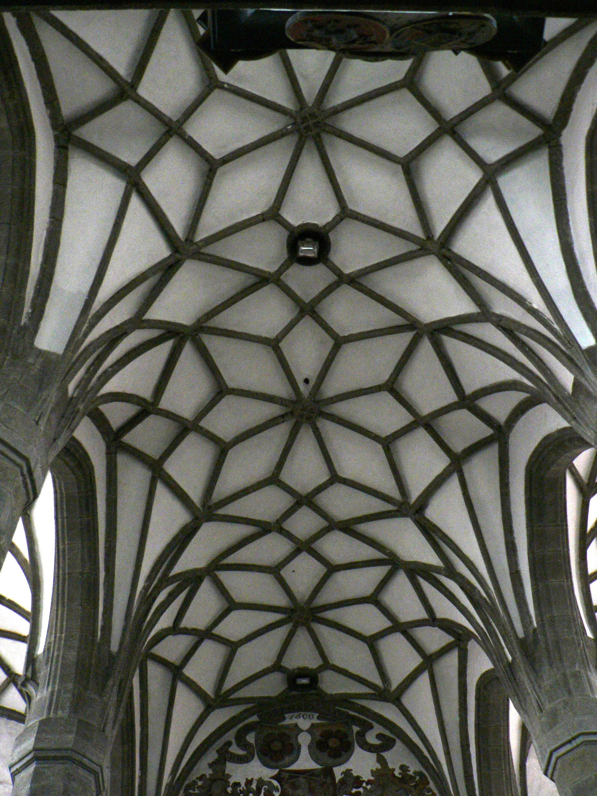 Kostel sv. Jakuba, Prachatice - síťová klenba hlavní lodi